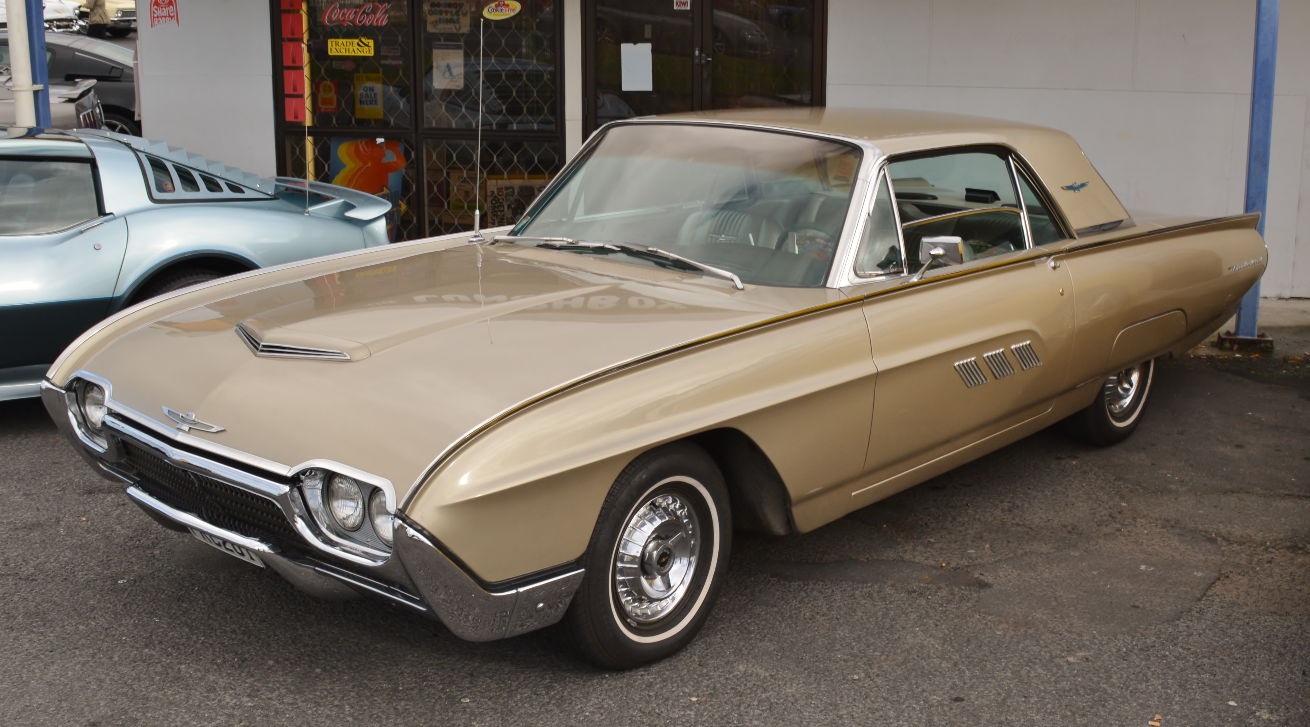 Henderson,West Auckland.New Zealand